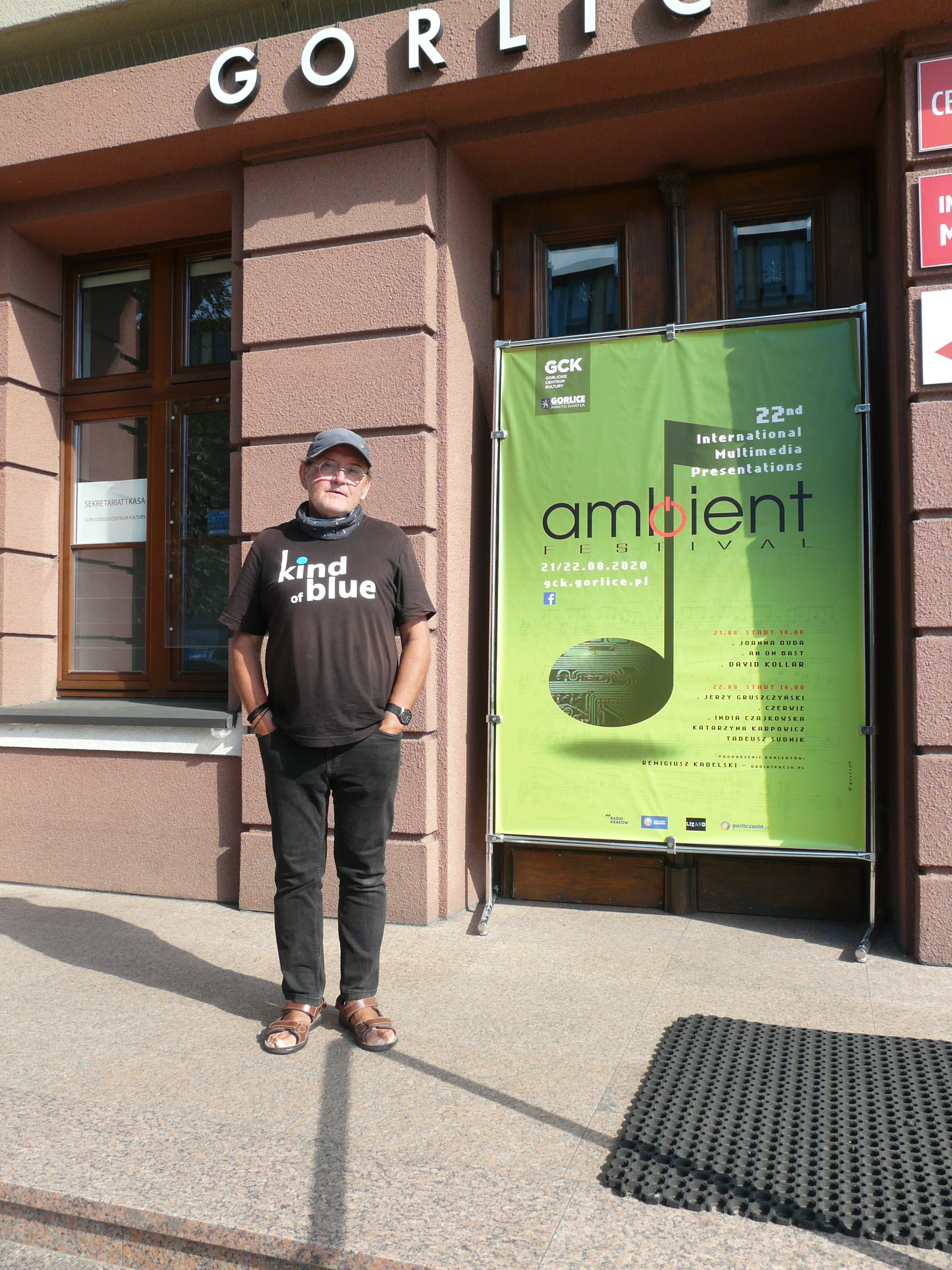 Tadeusz Łuczejko – polski twórca muzyki elektronicznej ambient, aranżer, artysta grafik, malarz, dyrektor artystyczny Międzynarodowych Prezentacji Multimedialnych Ambient Festiwal w Gorlicach. W tle plakat festiwalu MIĘDZYNARODOWYCH PREZENTACJI MULTIMEDIALNYCH AMBIENT FESTIVAL 2020.